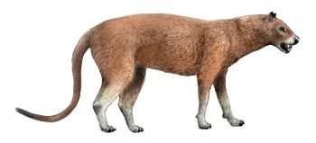 Daphoenodon restoration.